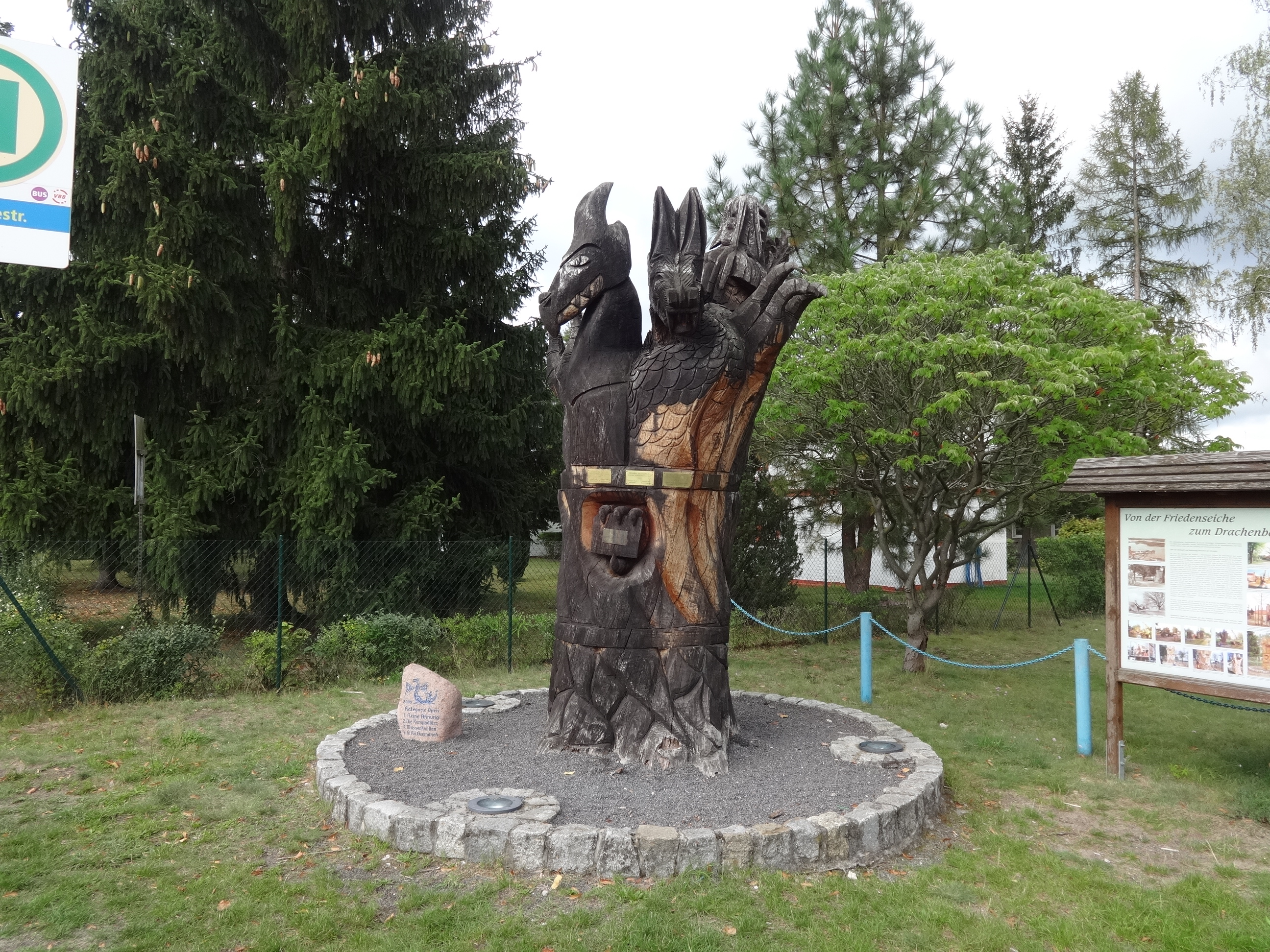 Drachenbaum in Klein Köris, eine ehemalige Friedenseiche, die zu einem Wahrzeichen der Gemeinde geworden ist.